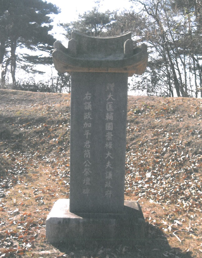 간석보(碩輔,8세)之 墓 경기도 화성시 장안면 사곡3리 산96-1